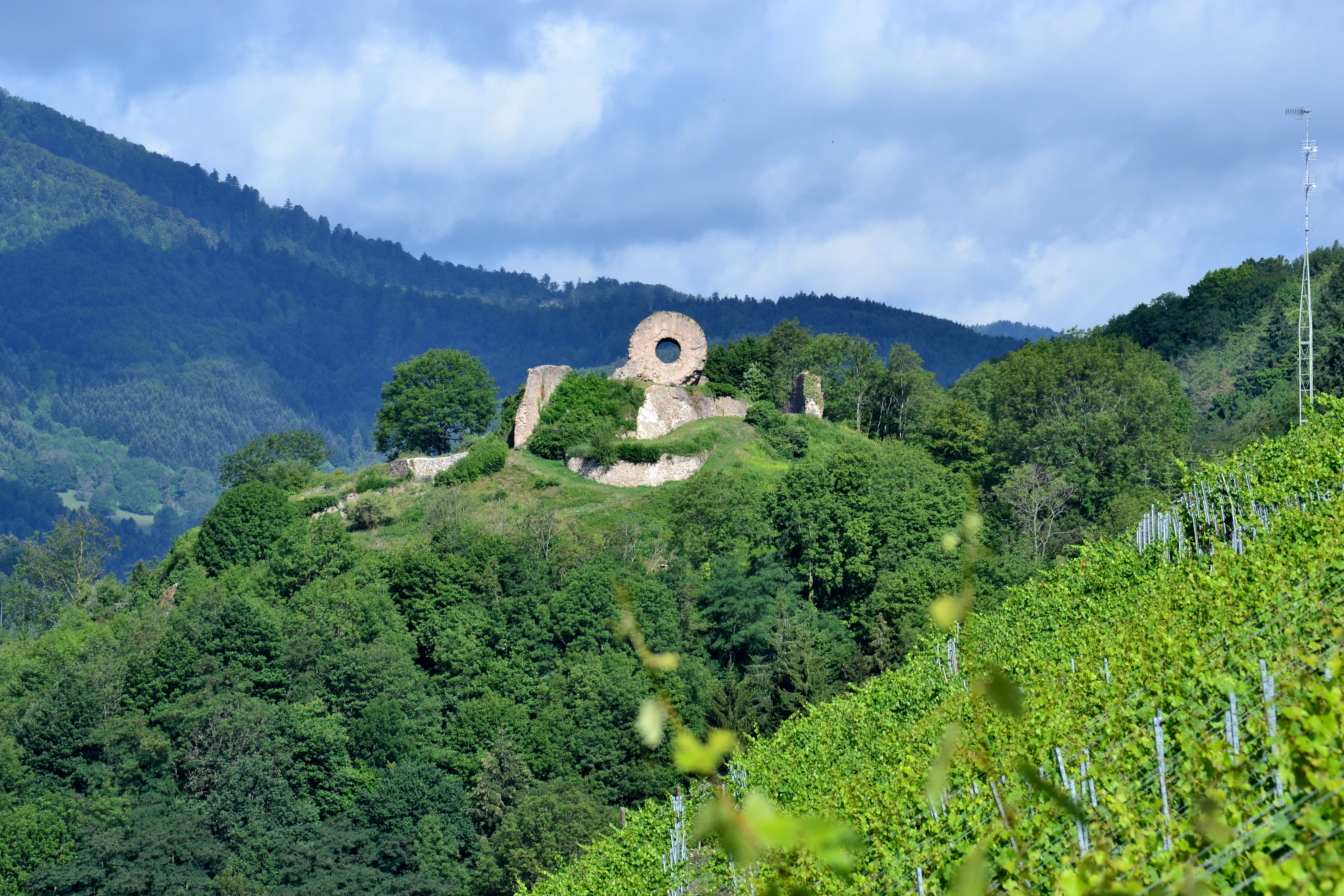 ruines de l'Engelbourg à Thann, Alsace, France